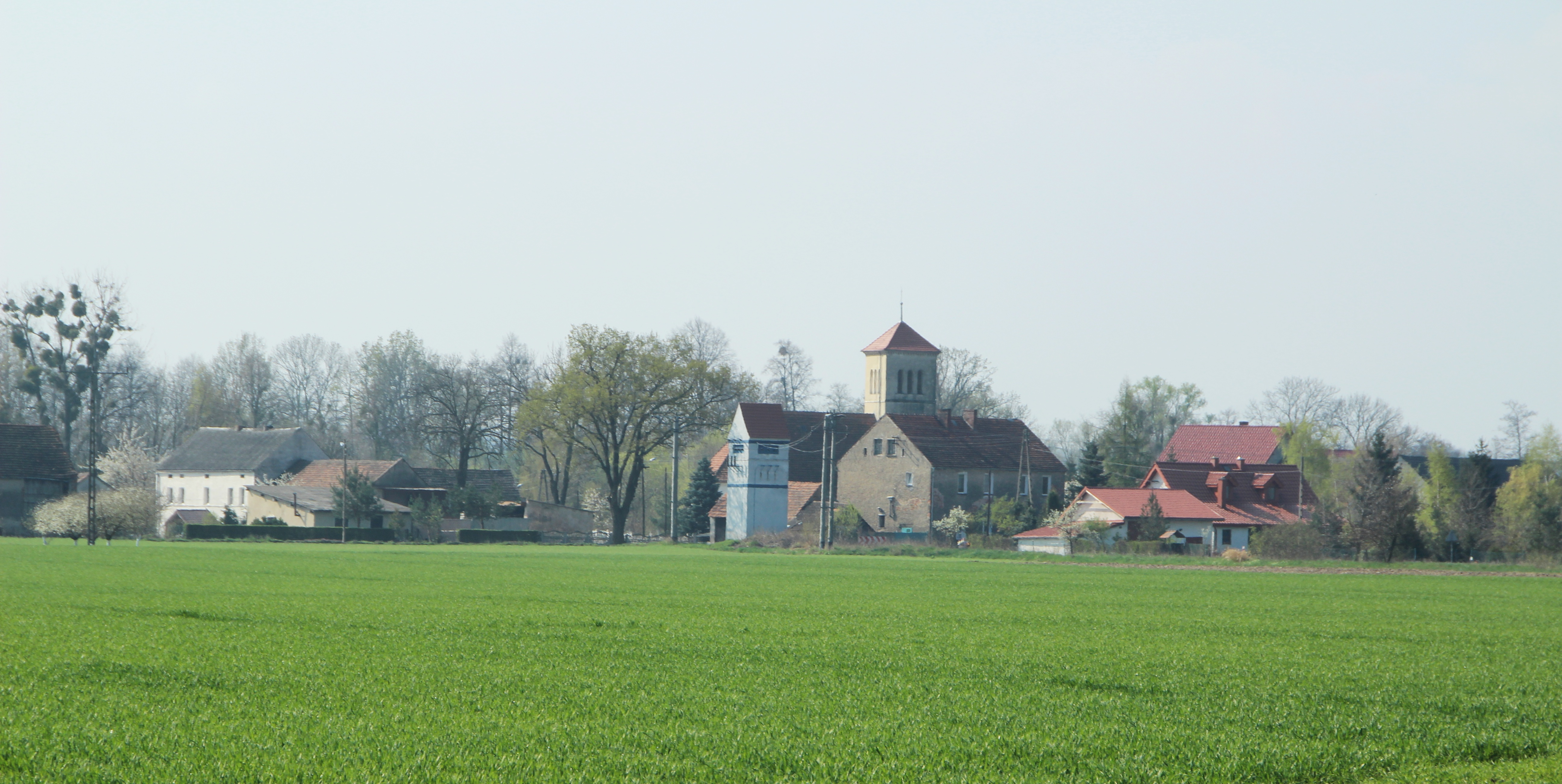 Rynarcice – wieś w Polsce położona w województwie opolskim, w powiecie nyskim, w gminie Korfantów.